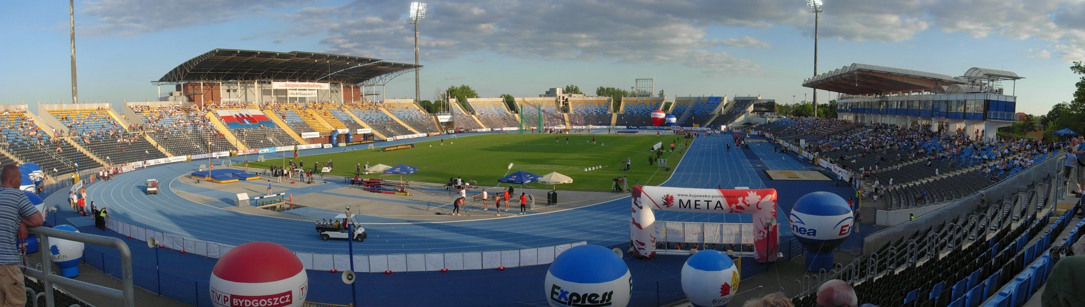 Stadion Zawiszy w Bydgoszczy podczas mityngu lekkoatletycznego Enea Cup w czerwcu 2011 r.